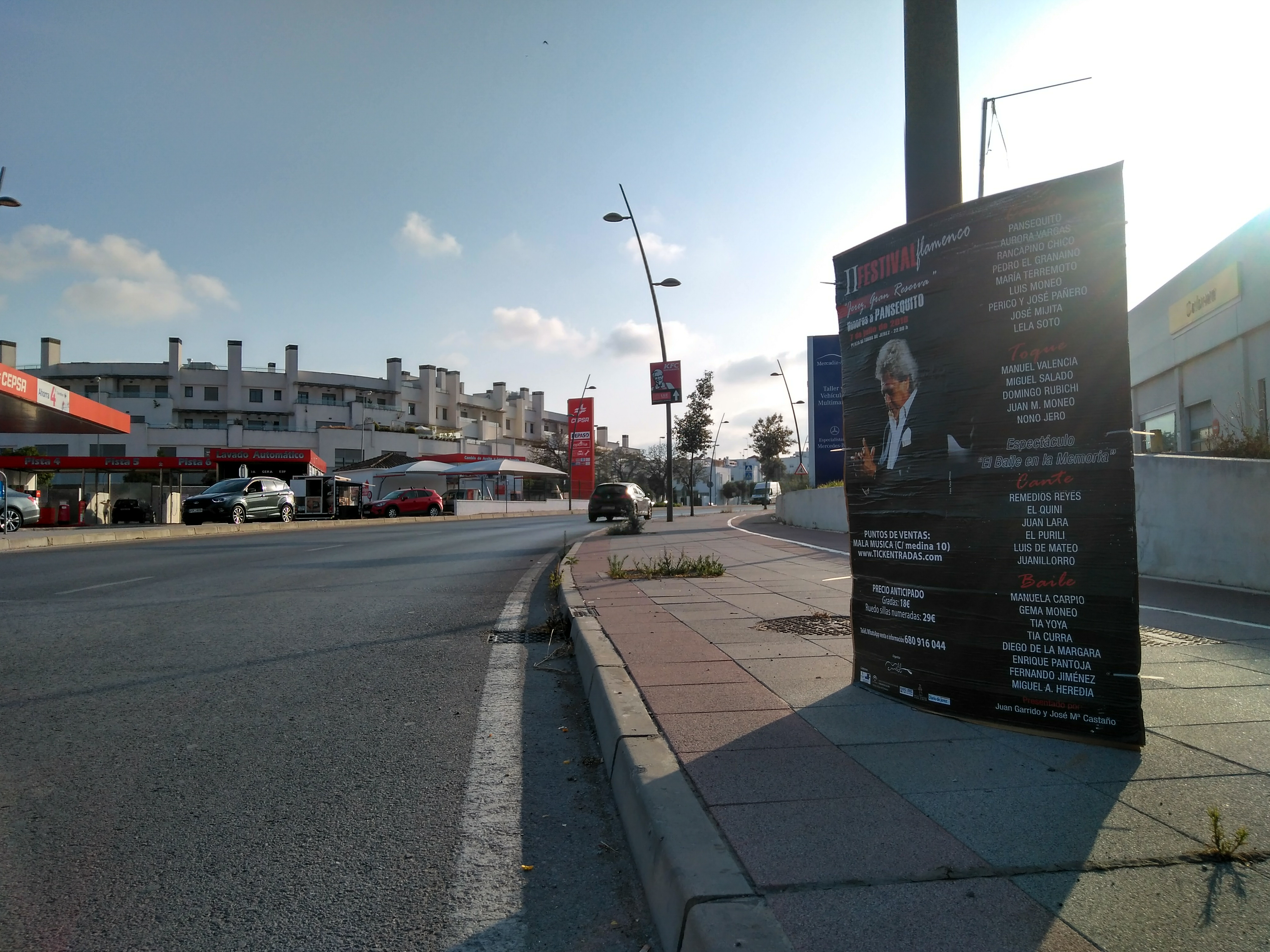 Cartel anunciador de concierto homenaje a Pansequito